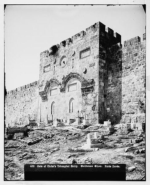 שער הרחמים. מאתר ספרית הקונגרס האמריקאי